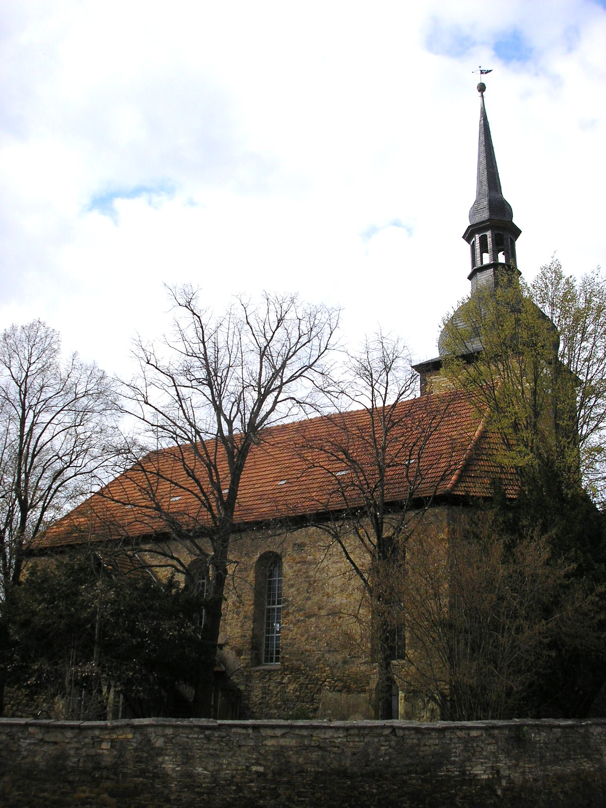 Die Petrikirche in Sömmerda (Thüringen).